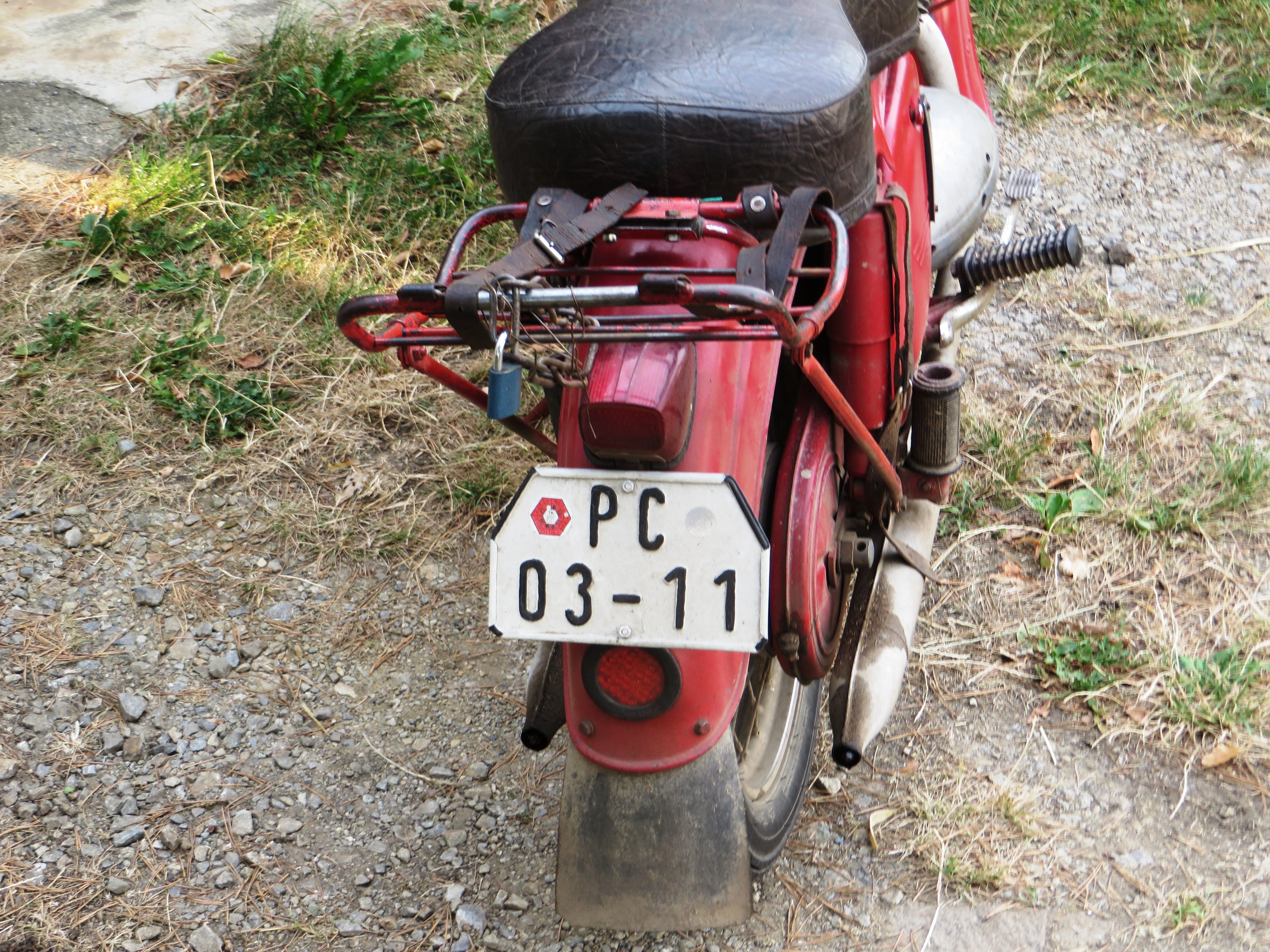 Oude kentekenplaat van een Tsjechische motorfiets